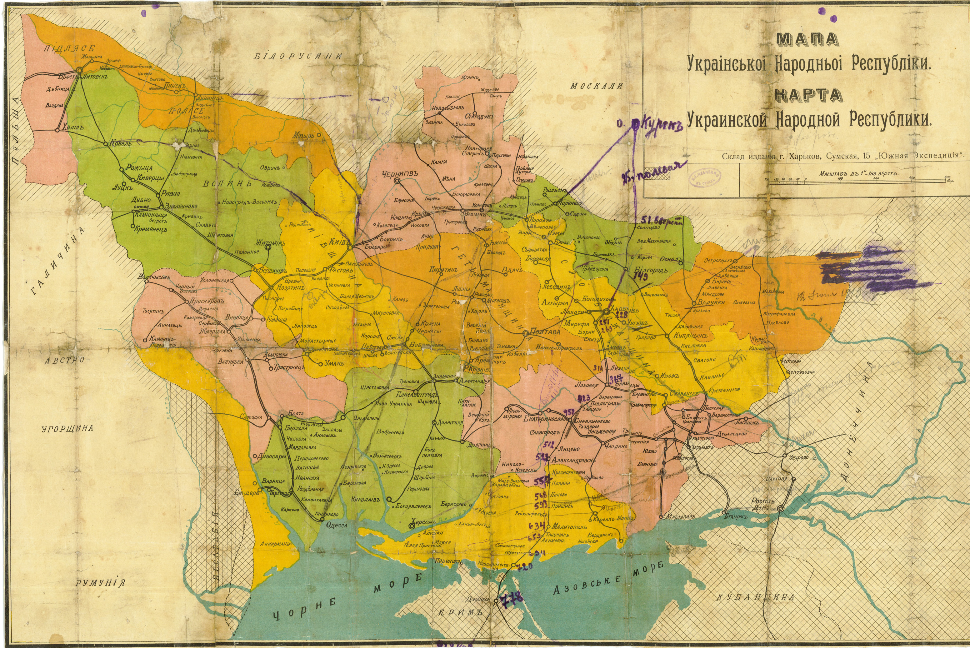 Карта УНР